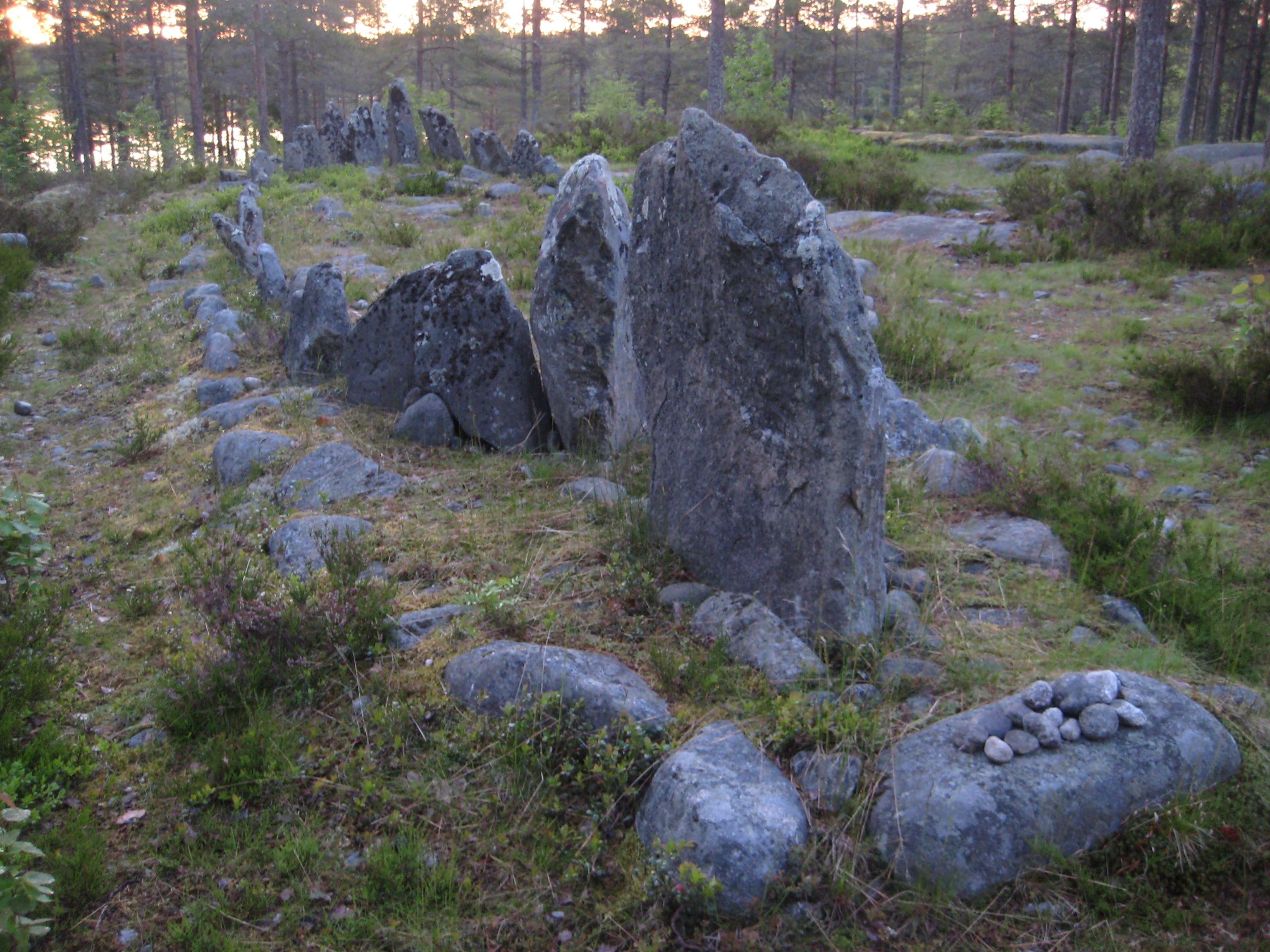 Skeppssättningen vid Mjösjön i Västerbotten.